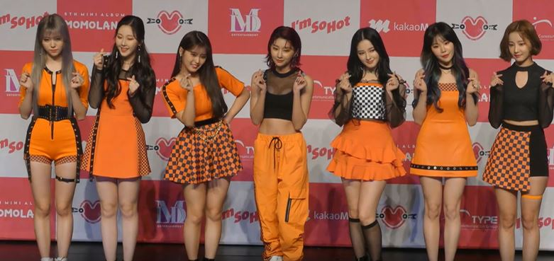 20일 오후 서울시 송파구 오륜동 K아트홀에서 모모랜드(혜빈, 연우, 제인, 태하, 나윤, 데이지, 아인, 주이, 낸시)의 다섯 번째 미니 앨범 'Show Me' 발매기념 쇼케이스가 열려 모모랜드가 멤버 단체 포토타임을 갖고 있다.